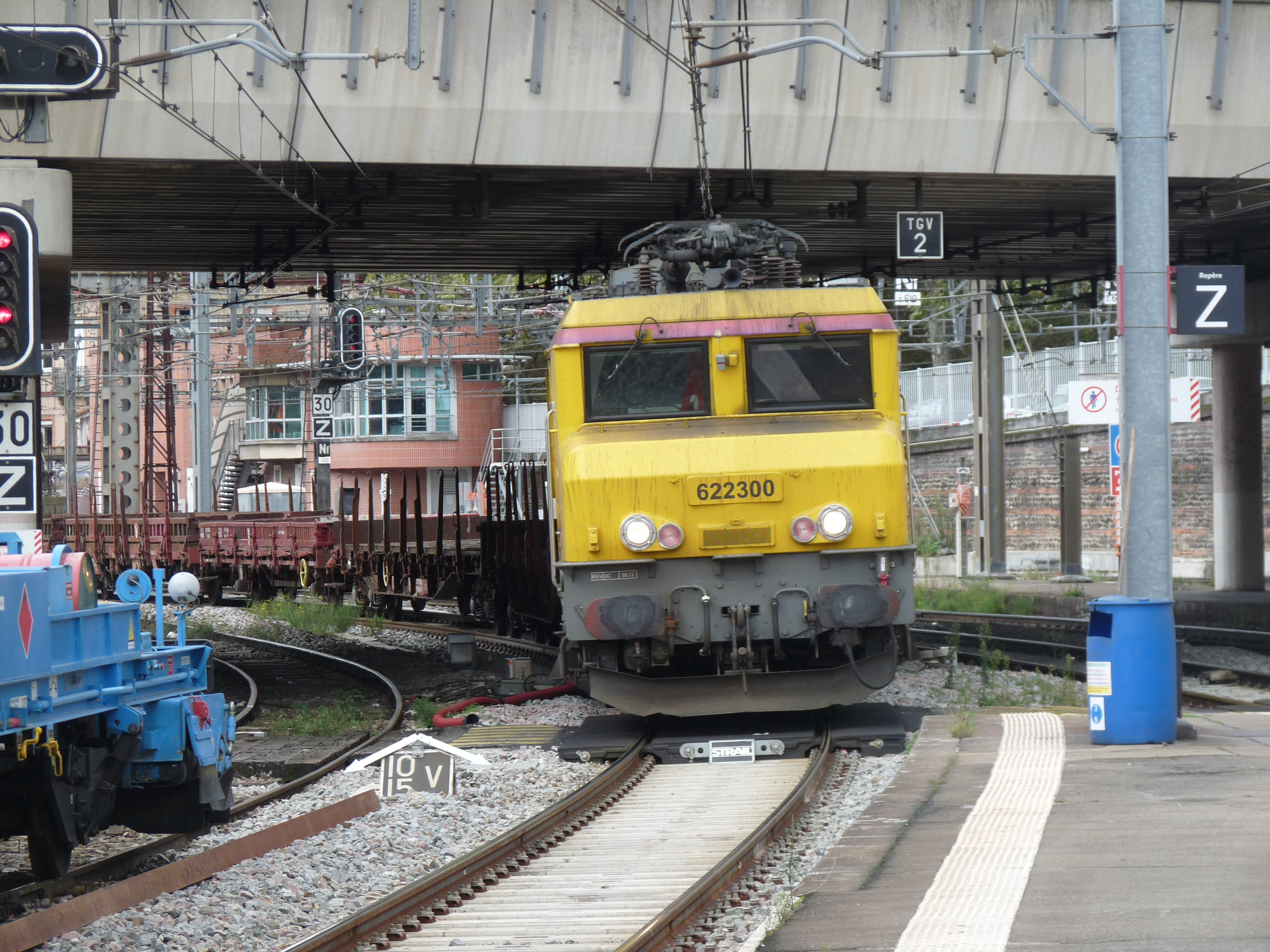 Goederentrein in Toulouse Matabiau